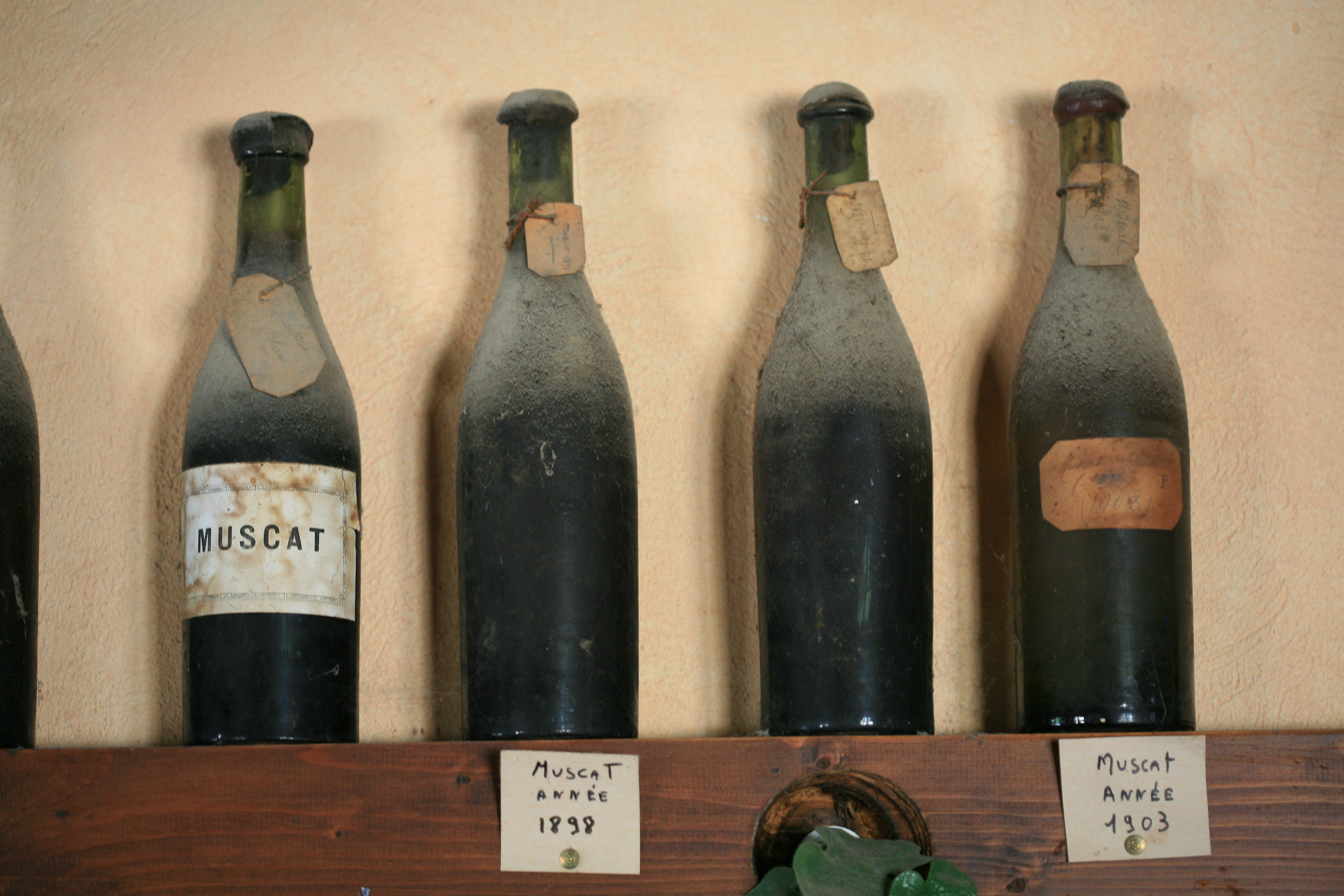 Vieilles bouteilles muscat (beaumes de venise, Vaucluse, France)